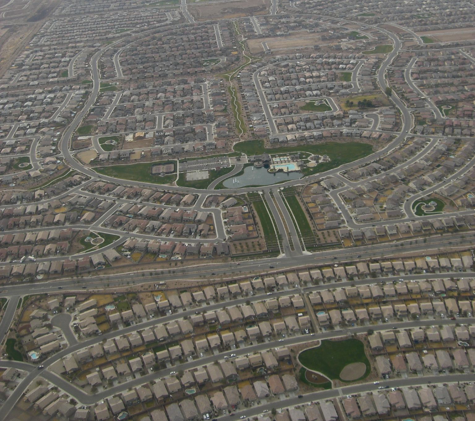 Aerial image of Maricopa, Arizona.